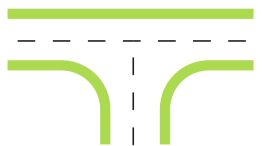 T形平面道路交叉口